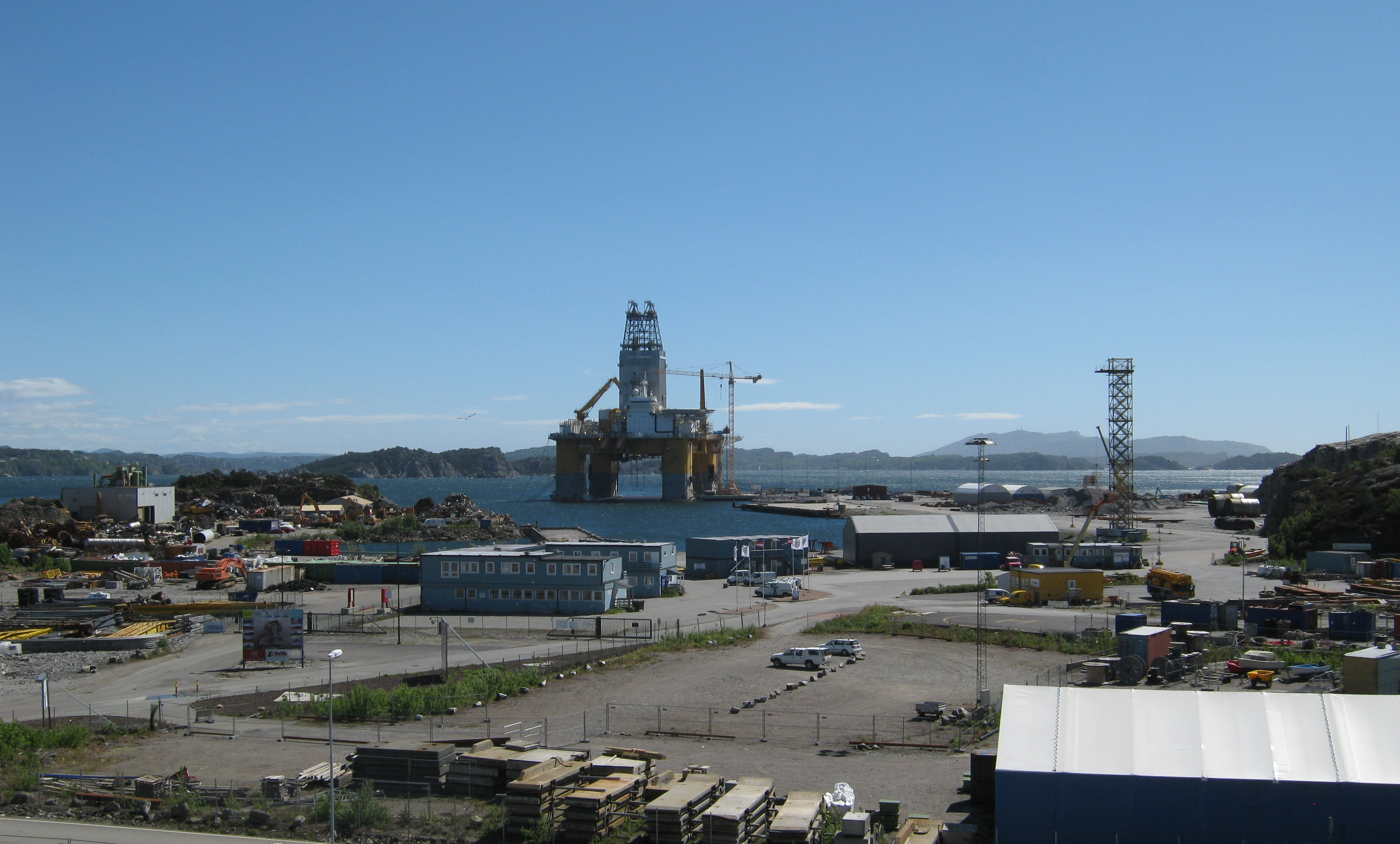 Hanøytangen industriområde i Askøy kommune. Boreriggen Deepsea Atlantic ses midt i bildet.